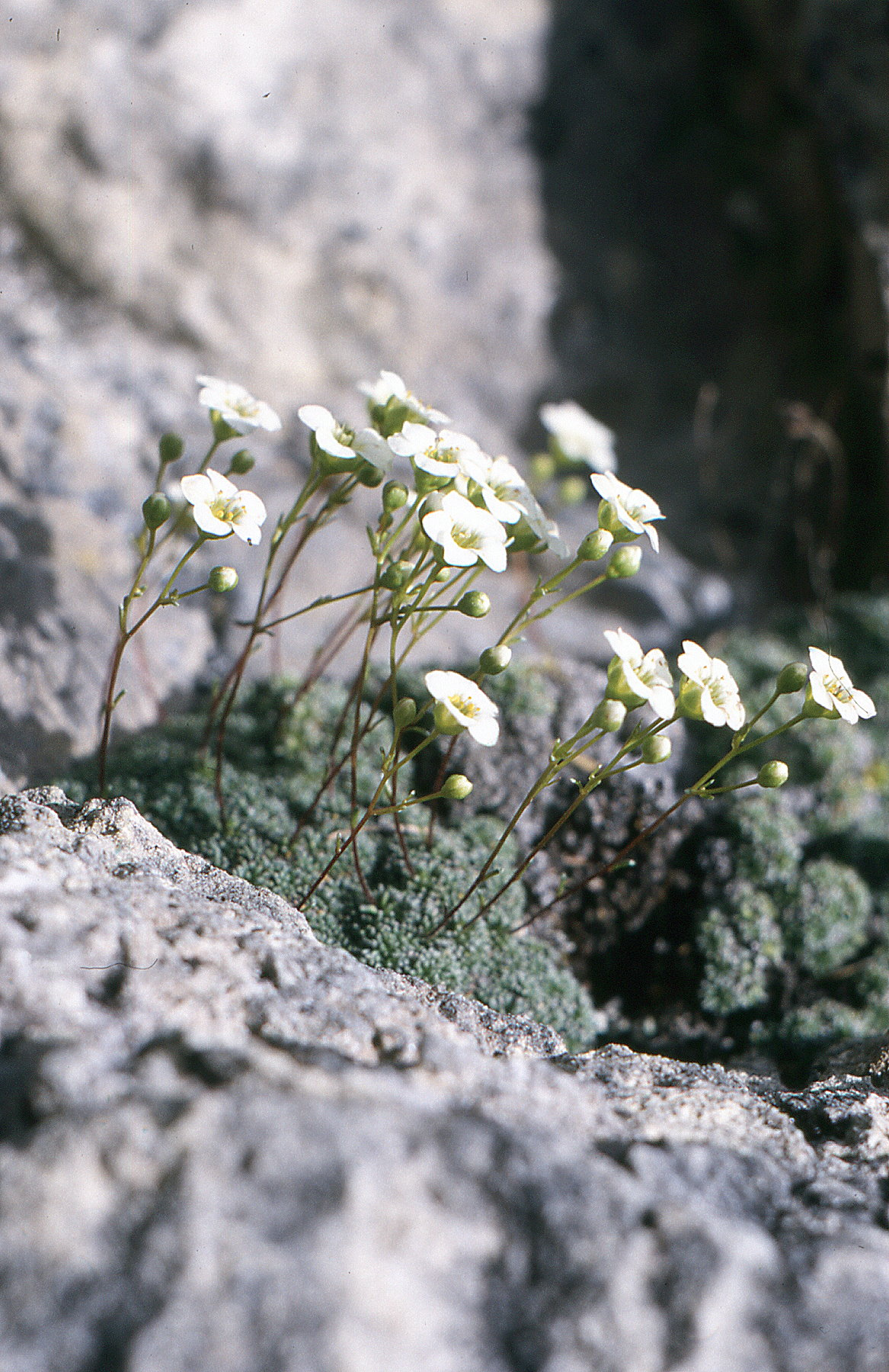 Saxifraga caesia L. Blaugrüner Steinbrech, Saxifragaceae, Italien, Südtirol, Welschnofen, Rosengarten Photo: U.Schmidt, 1987